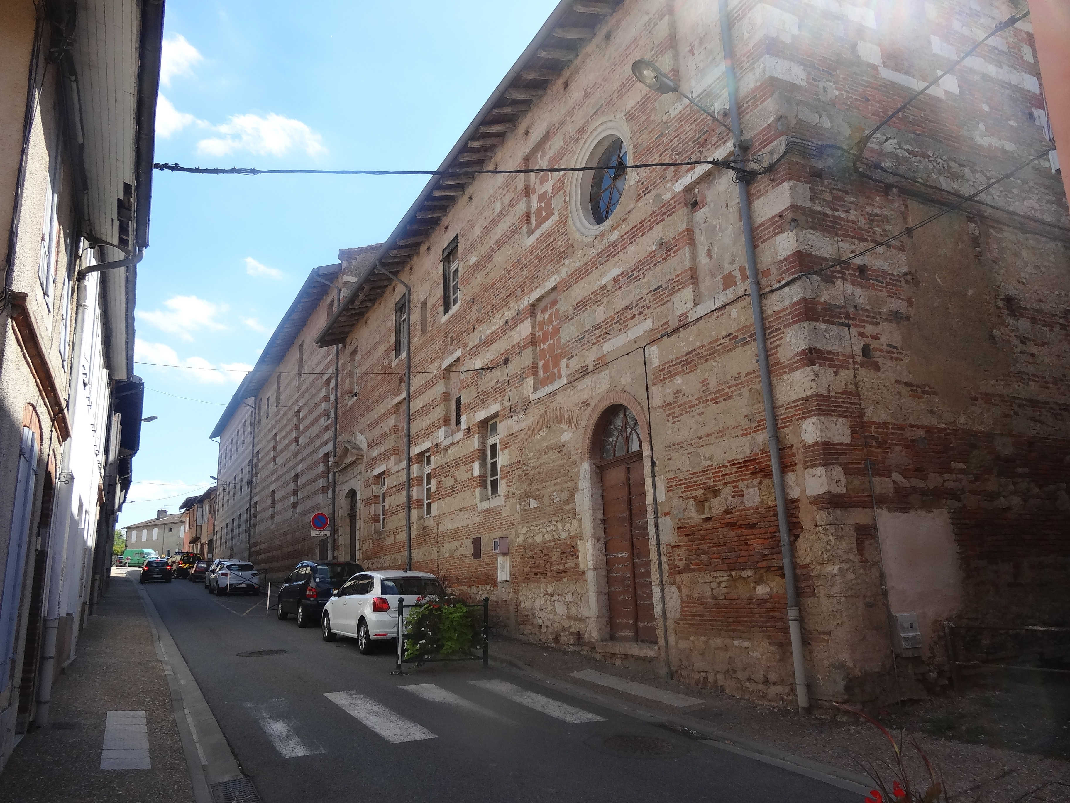 Établissement scolaire à Gimont.